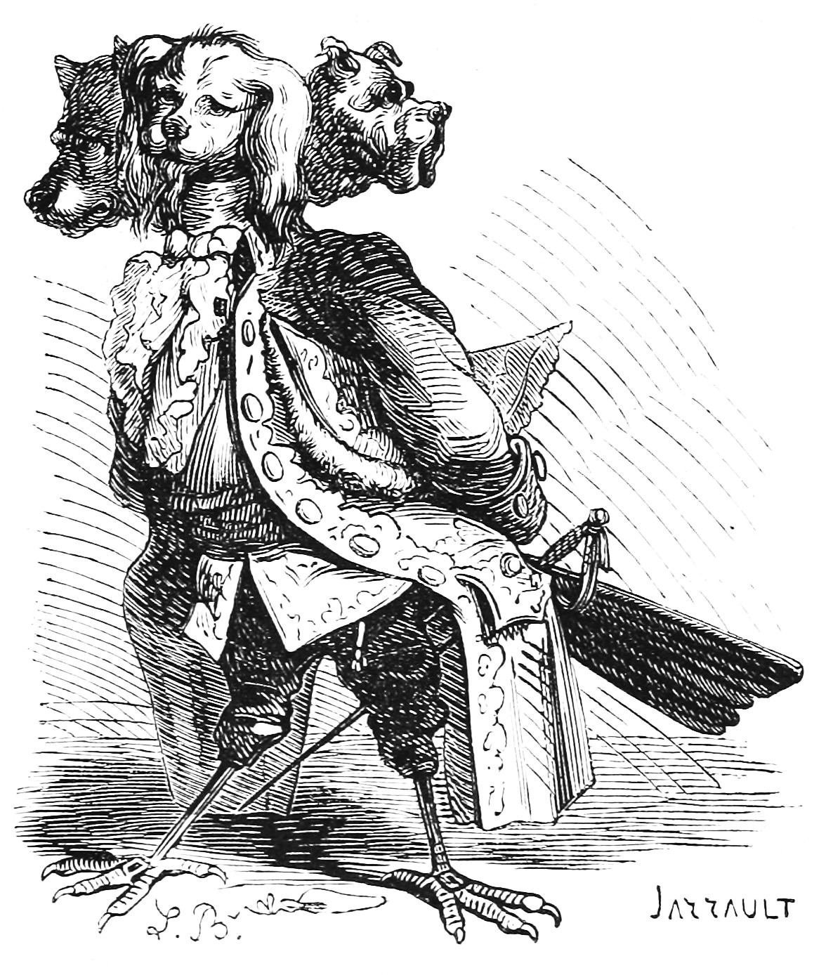 Illustration du Dictionnaire infernal par Louis Le Breton.